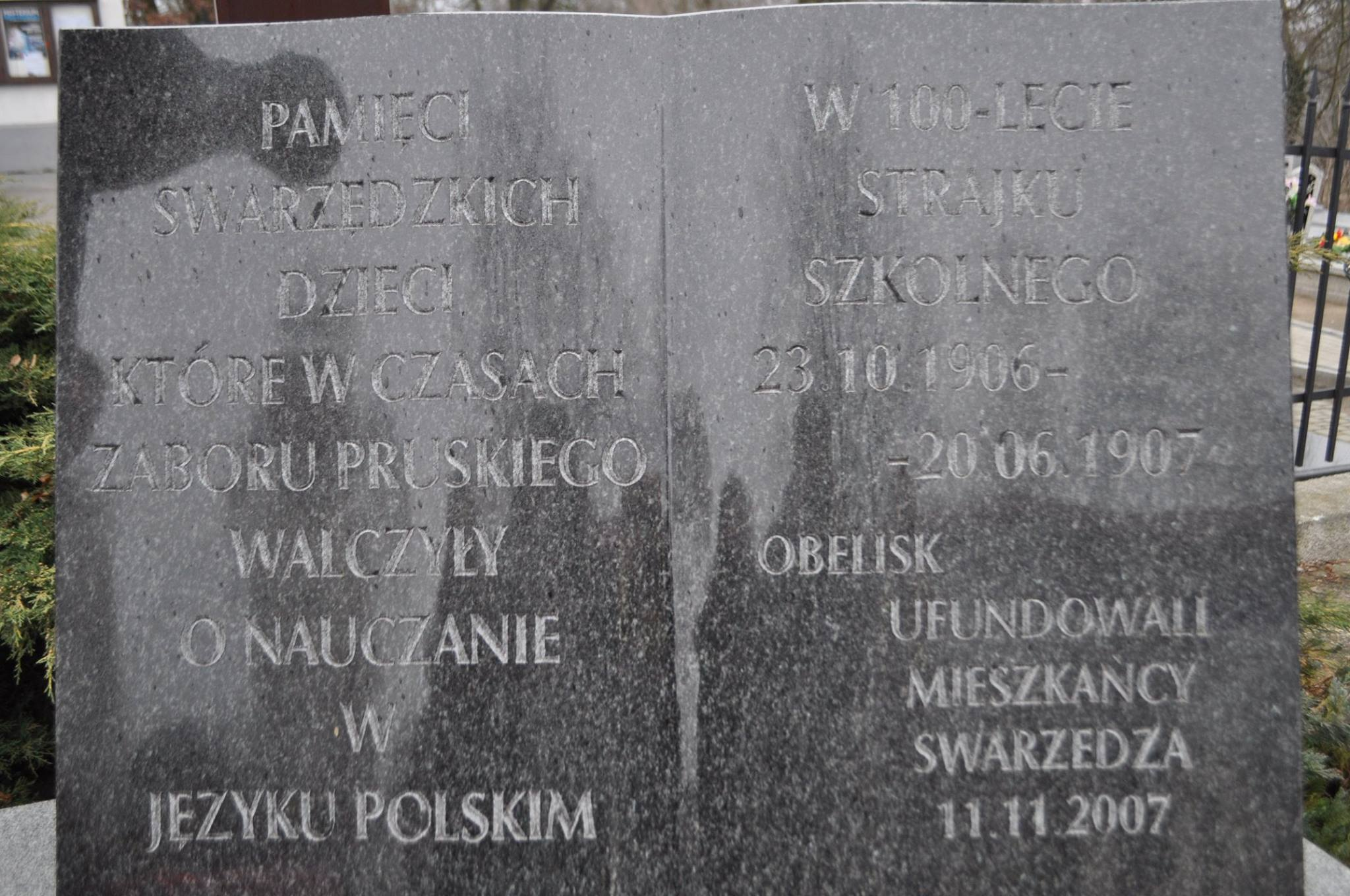 Tablica upamiętniająca strajk dzieci swarzędzkich znajdująca się przy kościele św. Marcina w Swarzędzu.